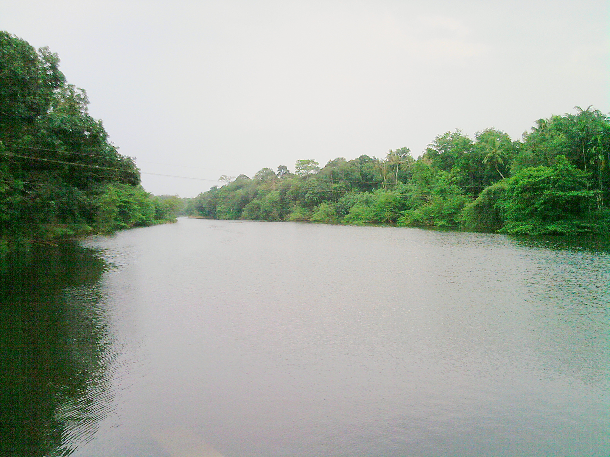 കാളിയാർ,മുവാറ്റുപുഴയുടെ ഒരു പോഷക നദിയാണ്.